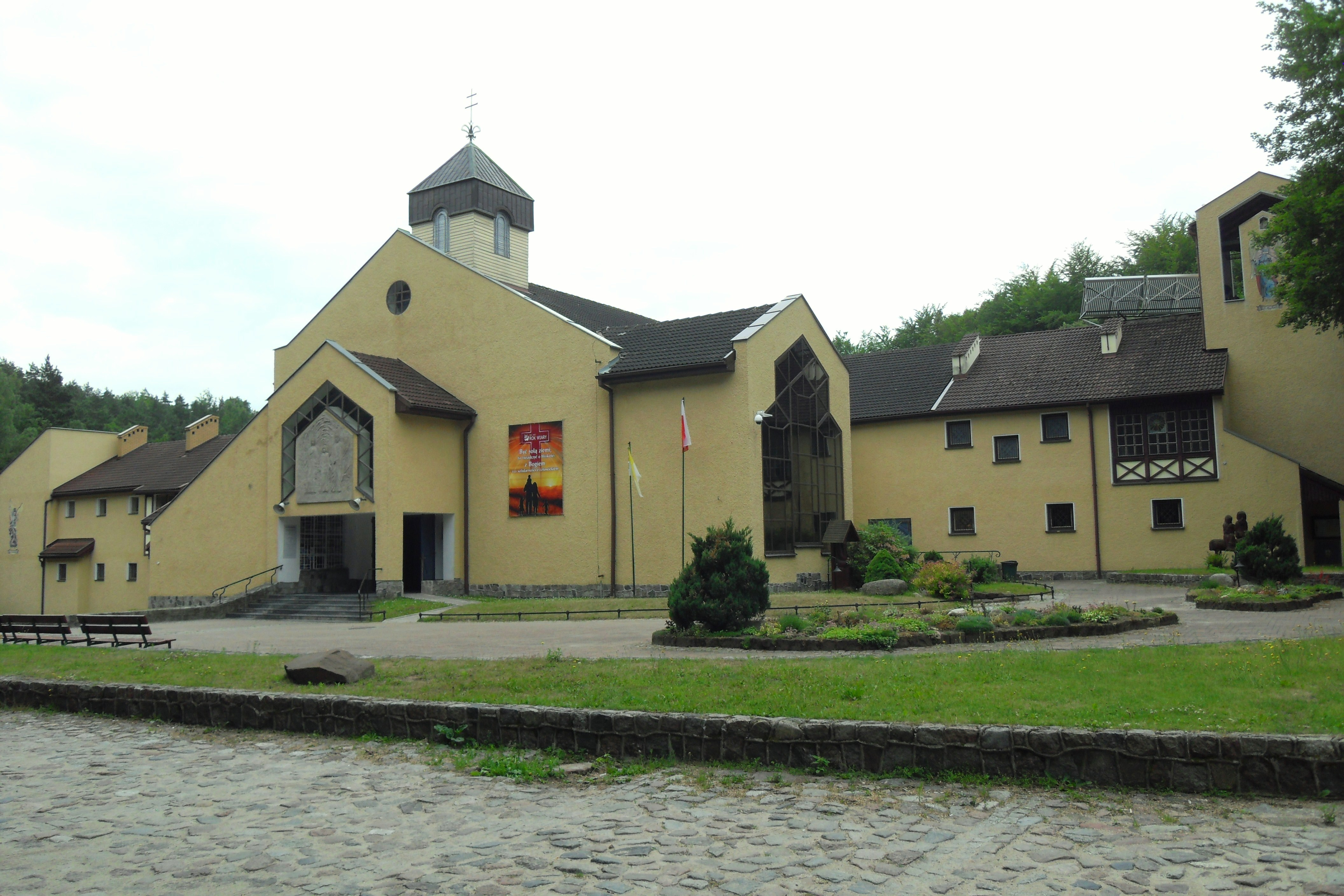 Gdańsk Matemblewo, kościół.